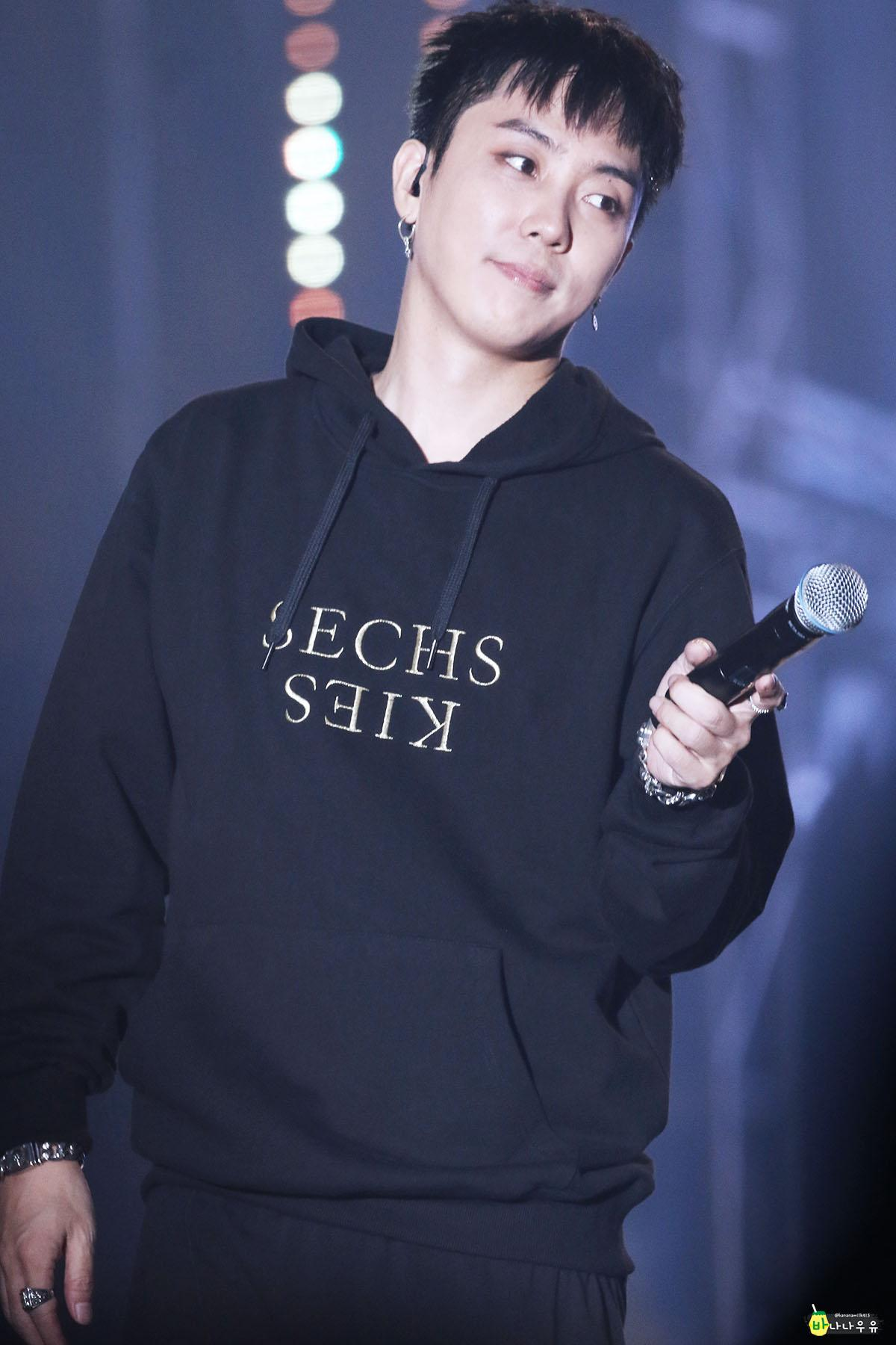 20180106 젝스키스 20주년콘서트 @대구